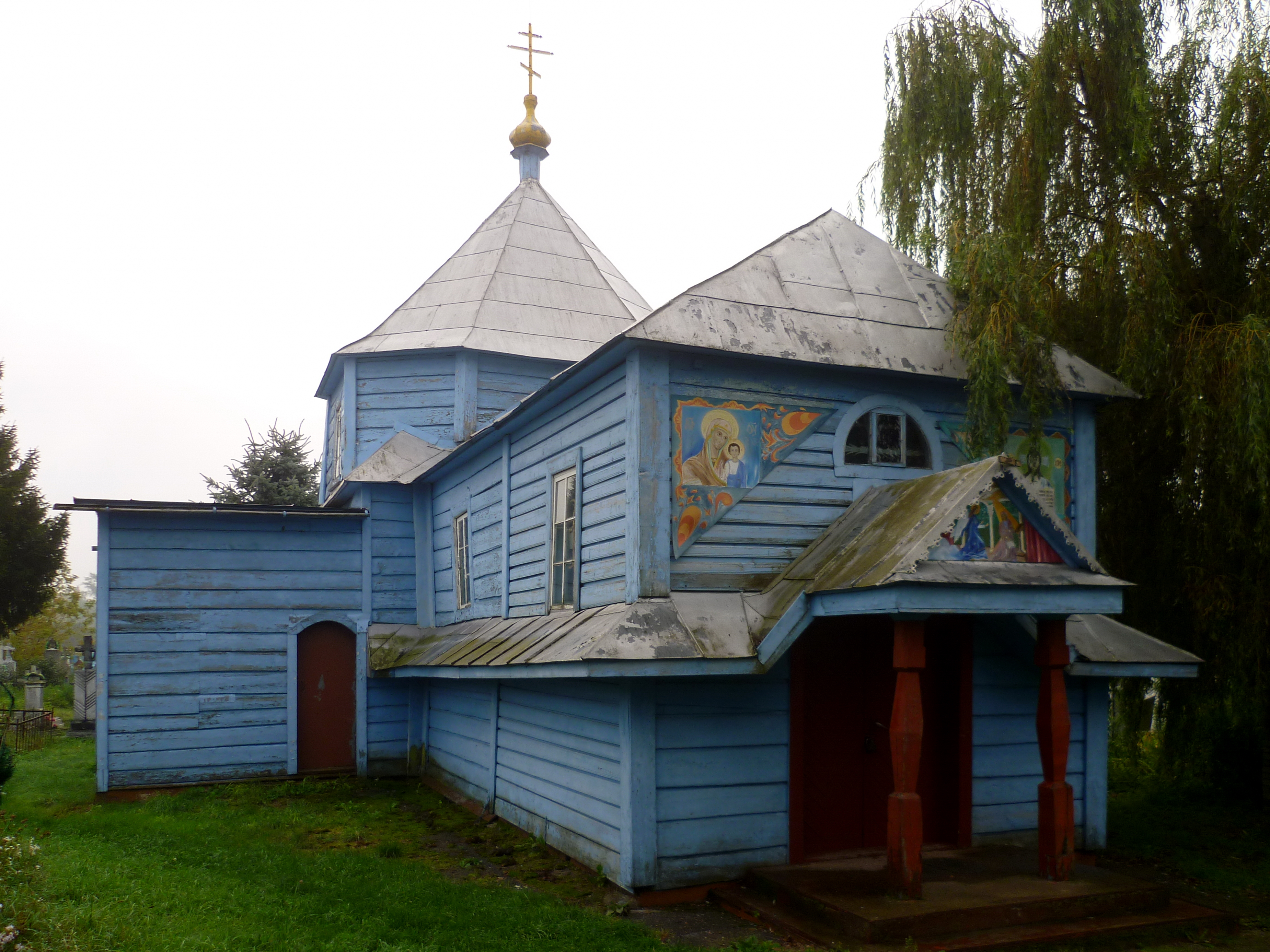 Церква сорока мучеників Севастійських (дер.) (18-19 ст.) - передній вигляд - смт Іваничі (на кладовищі) Волинська область Україна